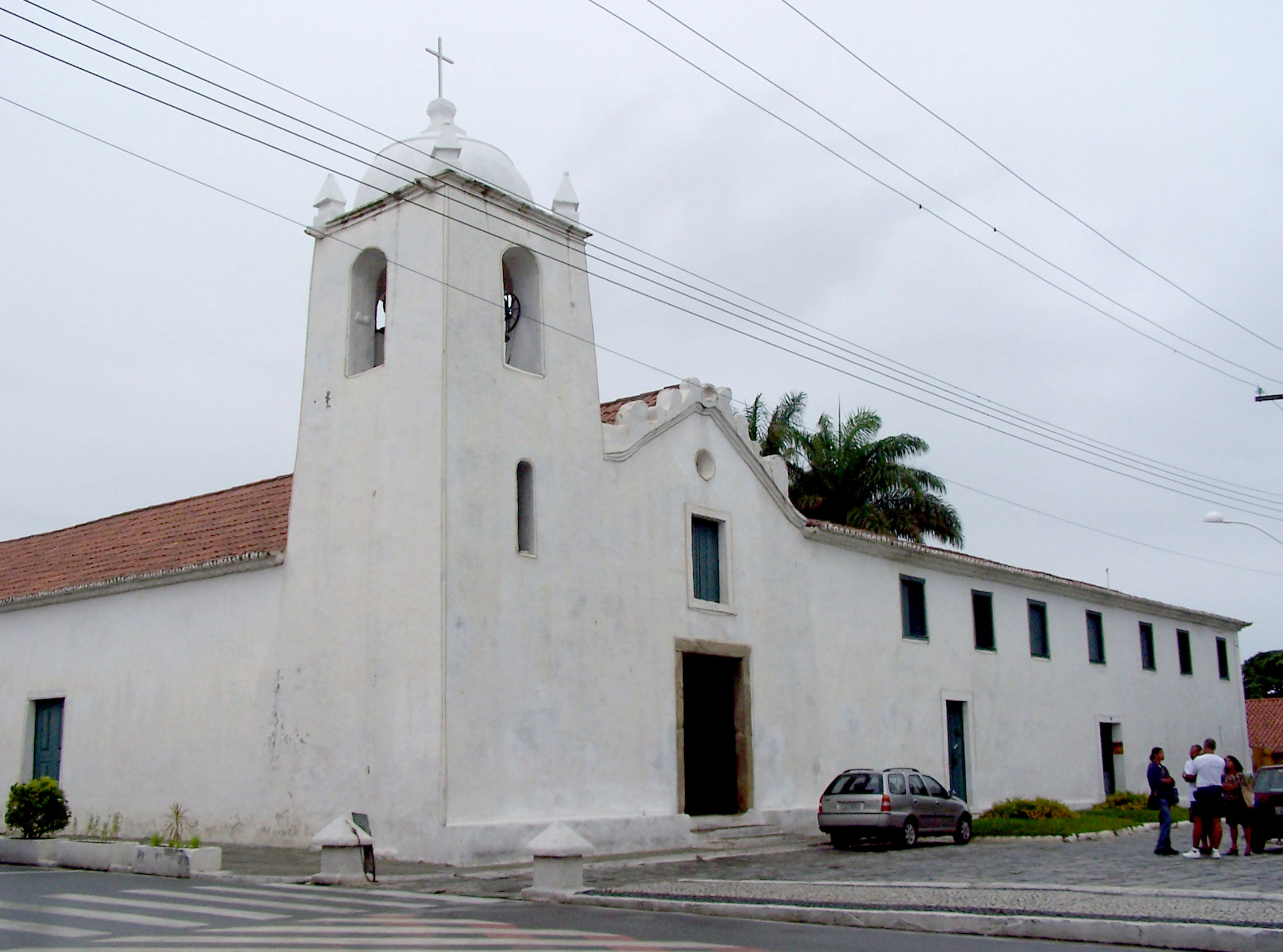 Old Jesuit church in São Pedro da Aldeia, Brazil